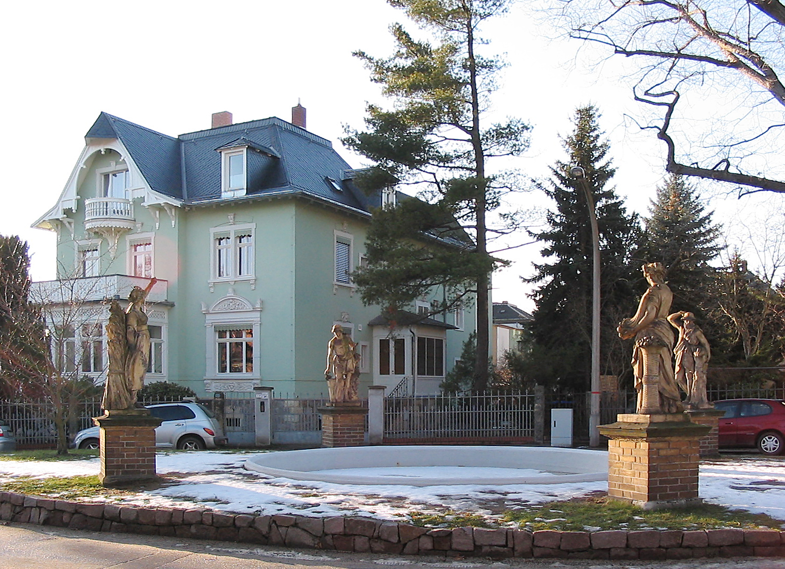 Radebeul, Fontainenplatz im Winter 2009, Brunnenbecken saniert und mit, für den Winter abgeschalteter, Fontainentechnik. Blick auf die Mietvilla Dr.-Schmincke-Allee 19 (Radebeul).